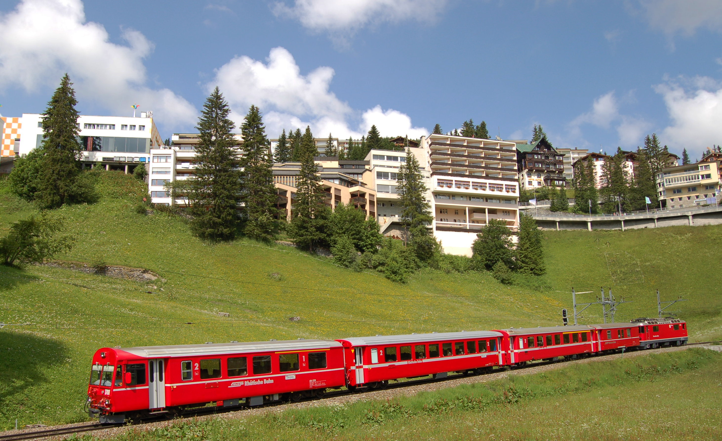 RhB Chur Arosa in Arosa Dorf